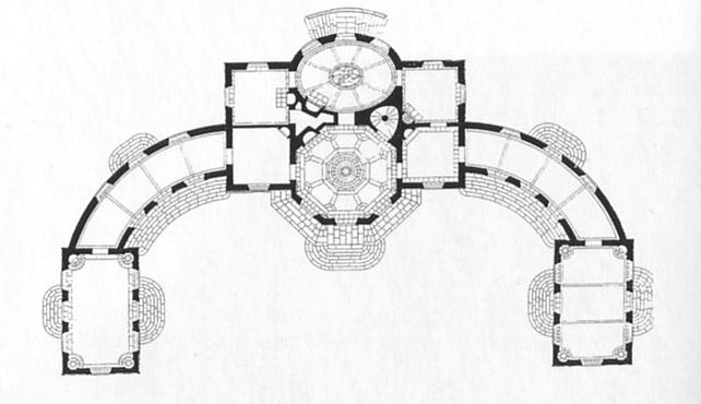 Planritning för Kina slott, Drottningholm